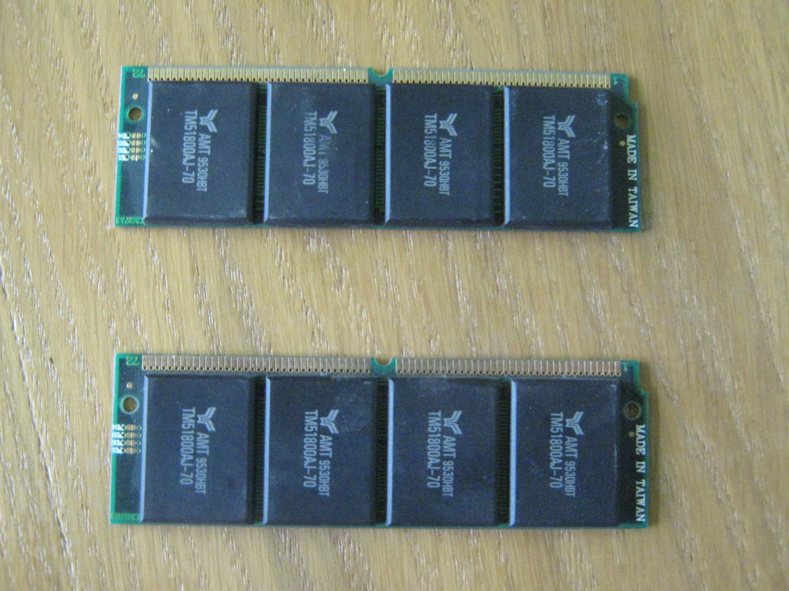 Оперативная память 2000-х годов (приблизительно по 64мб каждая плата)